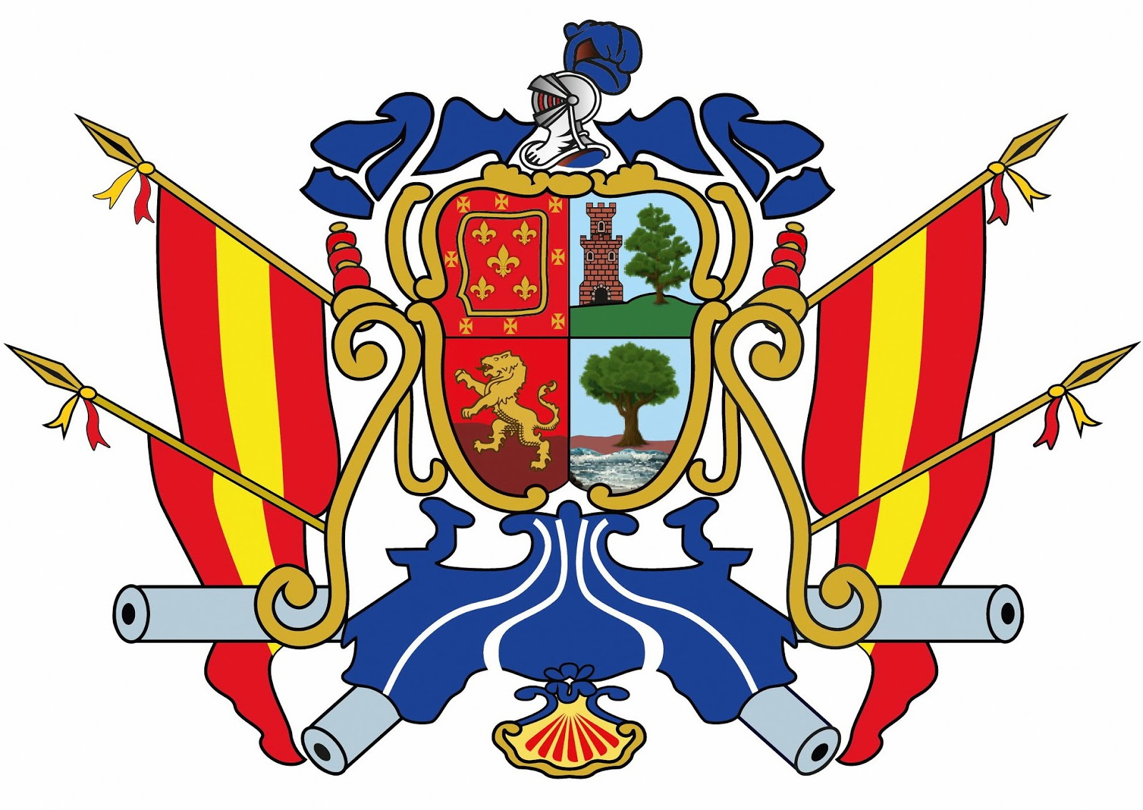 Escudo de Camaná